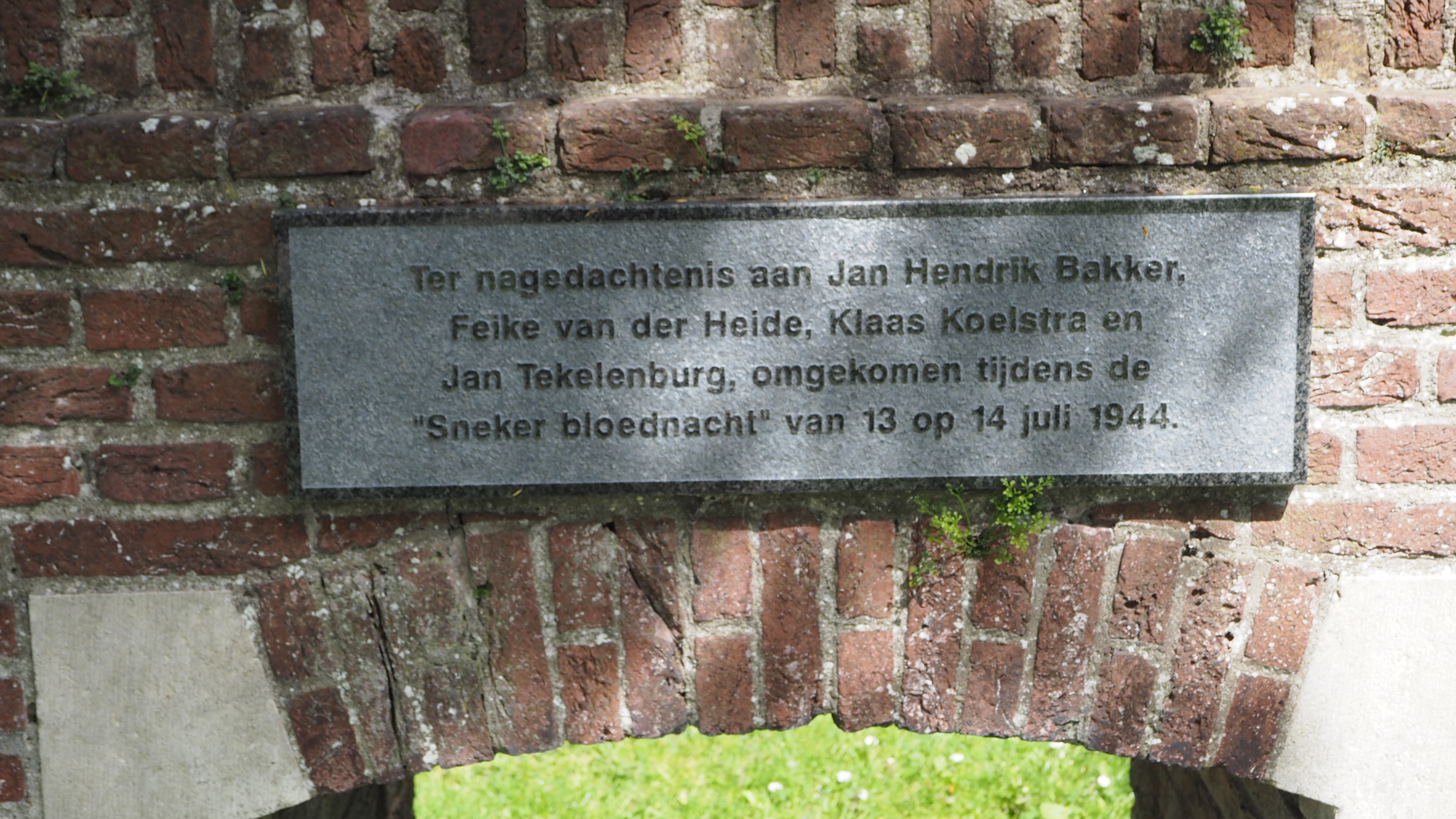 Oorlogsmonument in Sneek, Niederlande